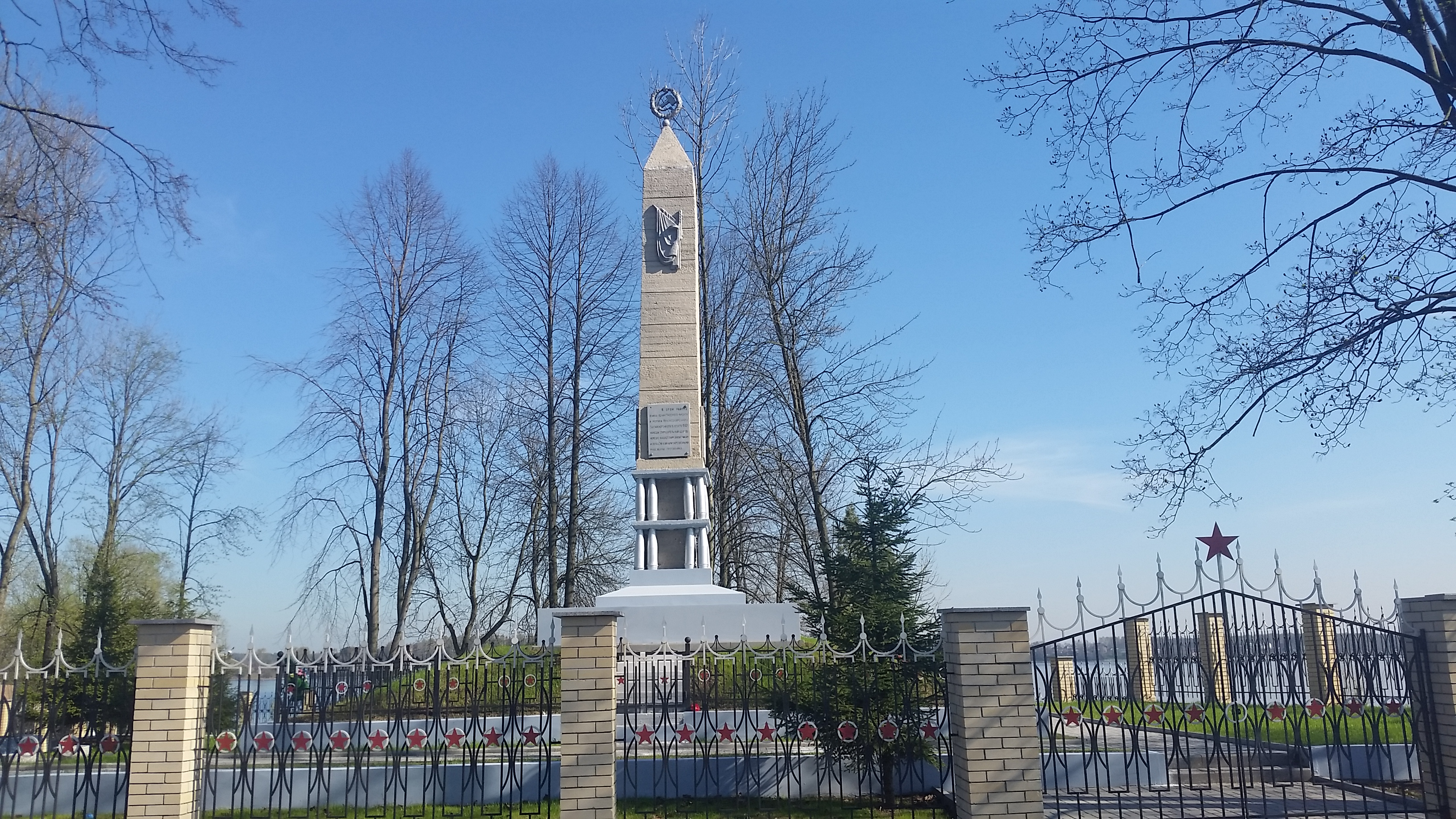 Ивановский пятачок - плацдарм на берегу реки Тосны, который во время Великой Отечественной войны захватили и удерживали советские войска